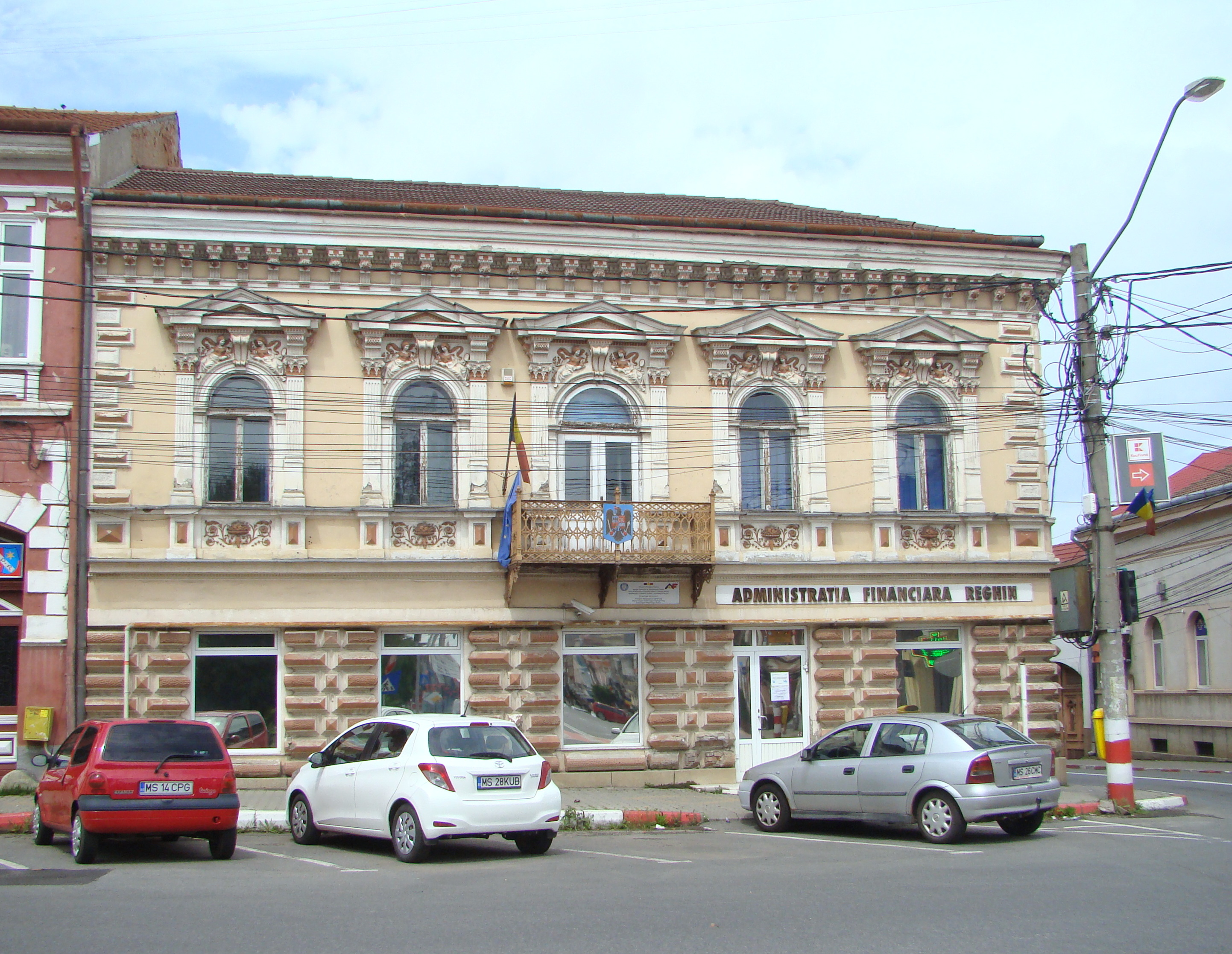 Ansamblul urban „Str. Petru Maior”, municipiul Reghin, str. Petru Maior de la nr. 4-55